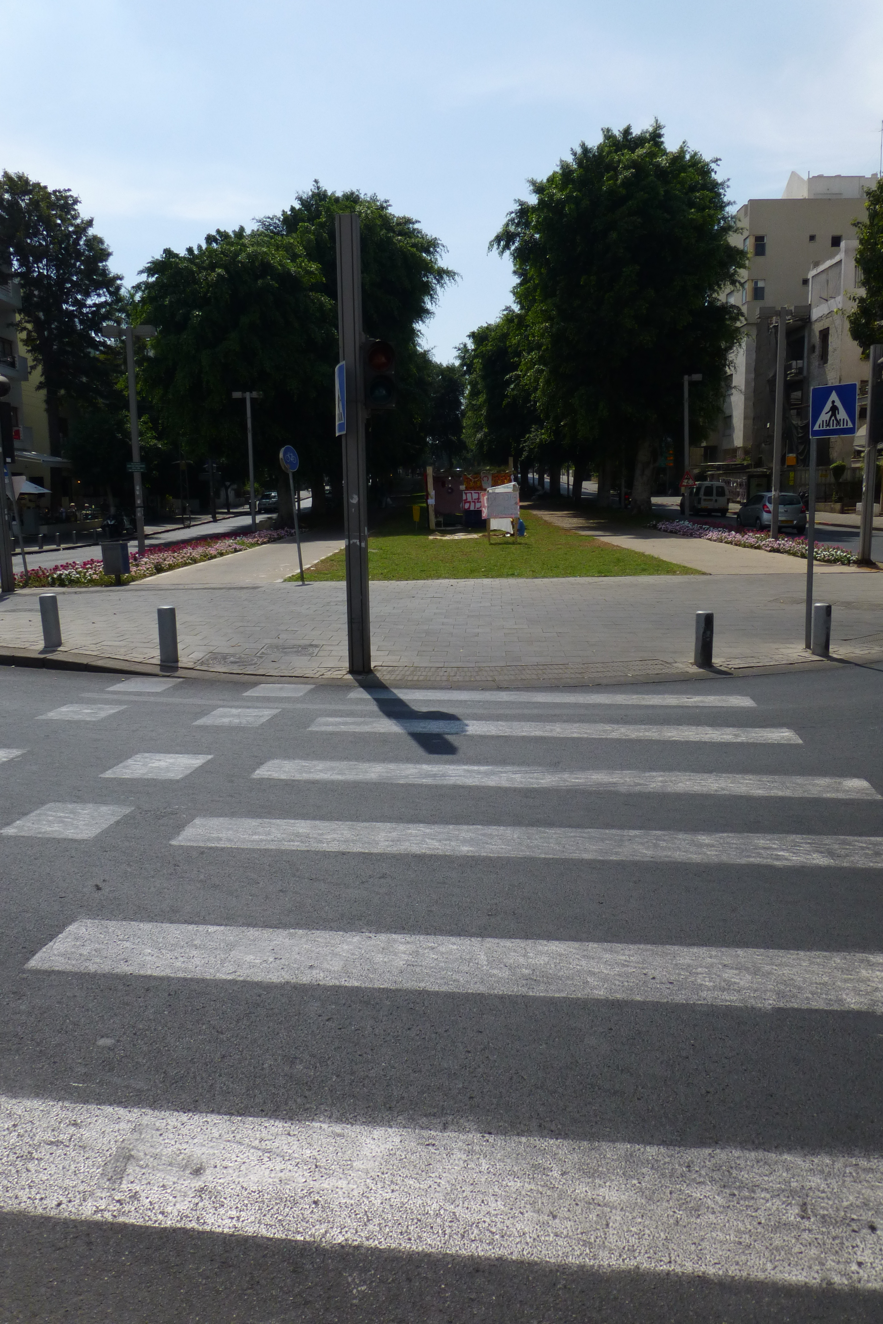 שדרות רוטשילד היו בין ארבעת הרחובות הראשונים של תל אביב (שנקראה אז "אחוזת בית"), שנחנכו לאחר רחוב הרצל (הרחוב הראשון בעיר), ובניצב אליו. הרחובות נסללו על גבי דיונות חול אשר יושרו ושוטחו, ולאורכם נבנו בתיה הראשונים של העיר. התוואי שהפך להיות השדרה היה ואדי קטן שאותו קשה היה ליישר באמצעים של אז, ואליו גם התנקזו מים רבים בחורף. בשל כך הוחלט למלאו בחול להשאירו כשטח פתוח שעליו לא ייבנו בתים אלא בצדיו, כרחוב עירוני רחב יותר. בט"ו בשבט ה'תר"ע (1910) החלו נטיעות בשטח פתוח זה, במטרה להפוך את הרחוב לשדרה הראשונה של העיר. חודשים אחדים לאחר מכן, בדצמבר 1910, החליט ועד אחוזת בית לקרוא לשדרה על שם הברון רוטשילד, ולמנות את מרדכי בן הלל הכהן ואת מאיר דיזנגוף להודיע על כך באופן רשמי לברון. אנשי אחוזת בית ראו בשדרה את תחילתה של שדרה מפוארת כדוגמת הבולווארים המפוארים של פריז.